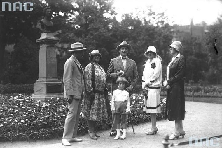 Śpiewak Adam Didur z rodziną pod pomnikiem Fryderyka Chopina na Plantach. Stoją od prawej: Olga Didur-Wiktorowa, Mary Didur-Załuska, Adam Didur, synek Olgi Didur-Wiktorowej, pani Didur, hrabia Ireneusz Załuski.